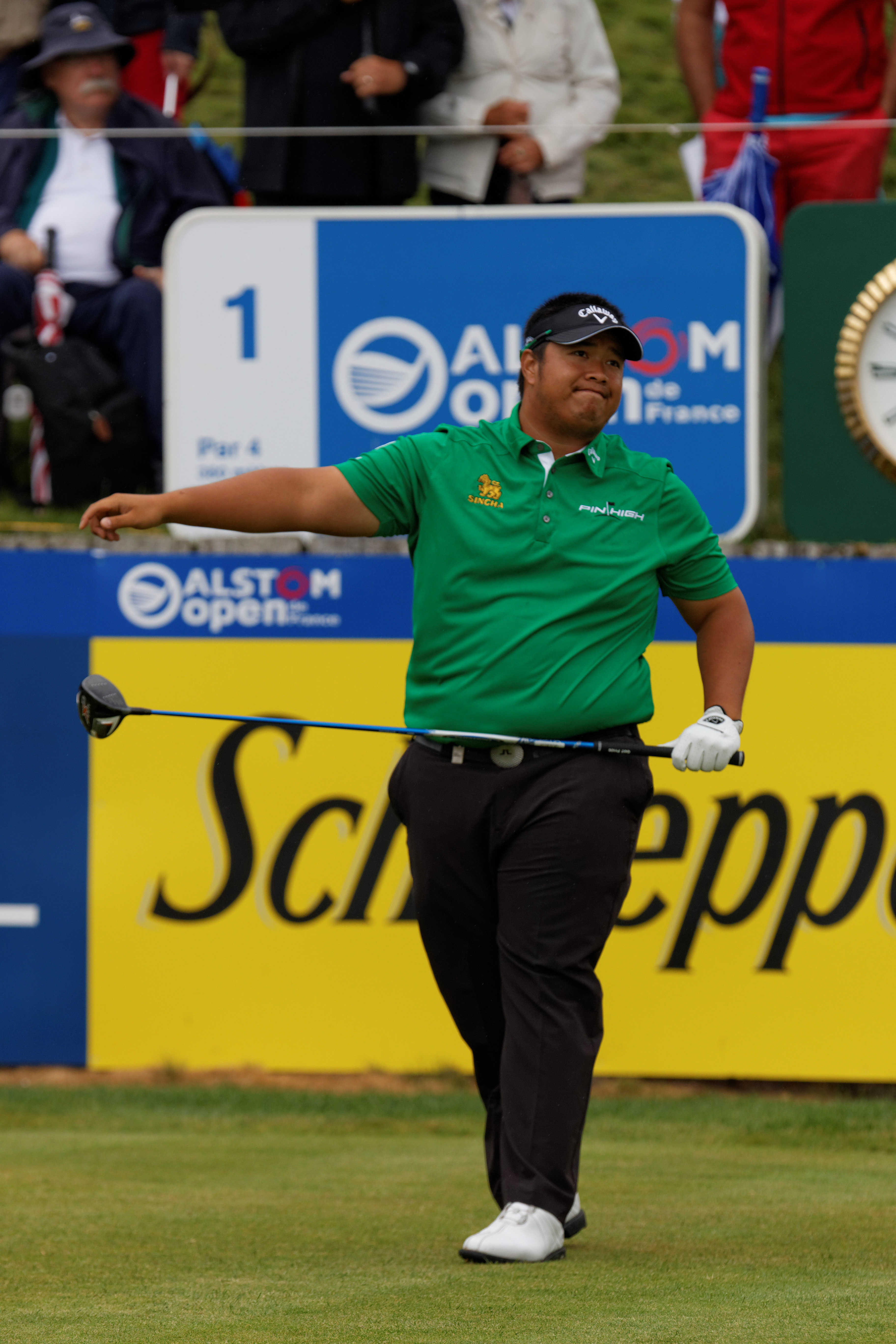 Kiradech Aphibarnrat lors du quatrième tour de l'Open de France 2014 - Golf National - Saint-Quentin-en-Yvelines (78) - départ du trou n° 1